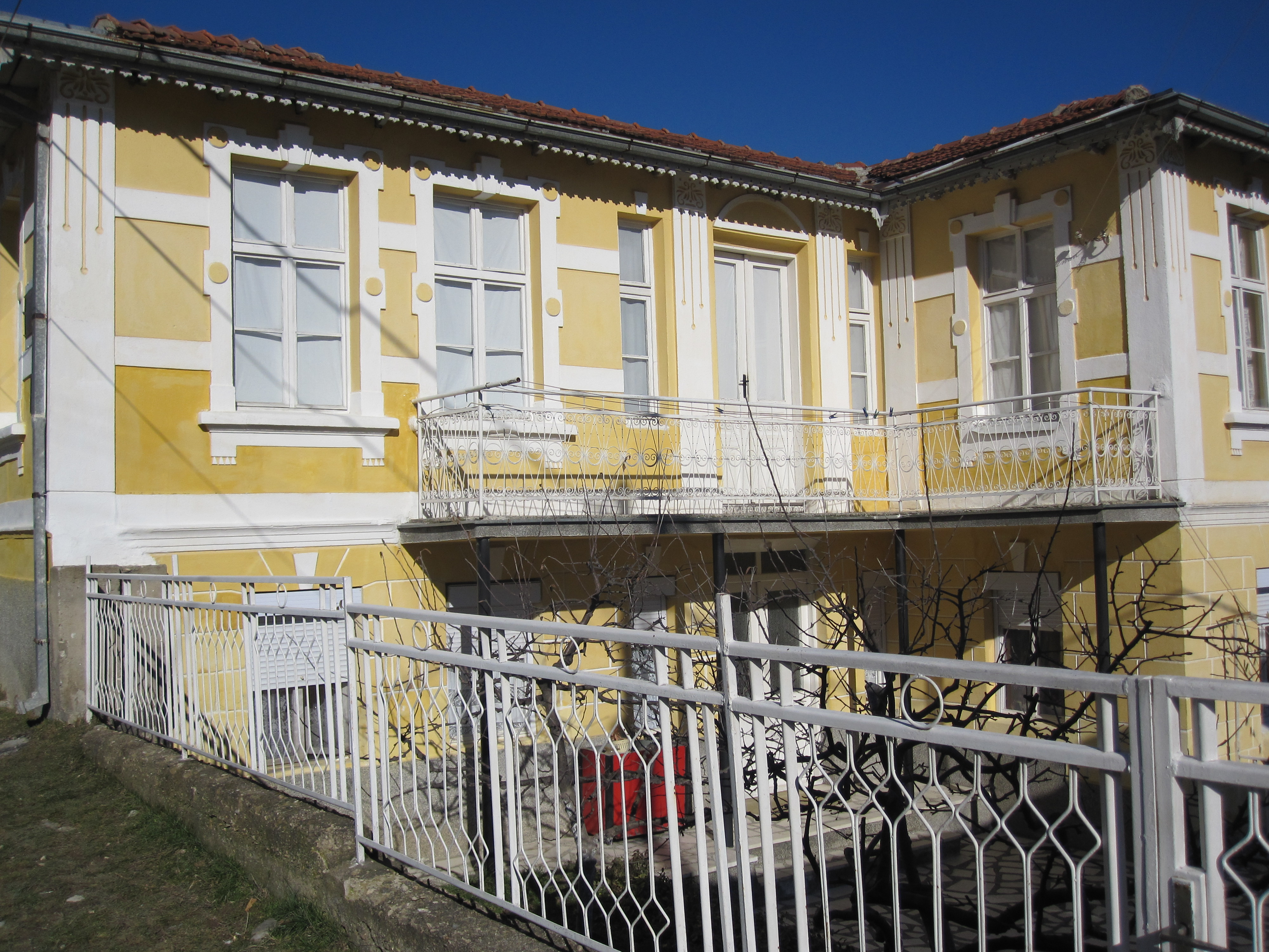 Куќата од Никола Карев - Крушево.